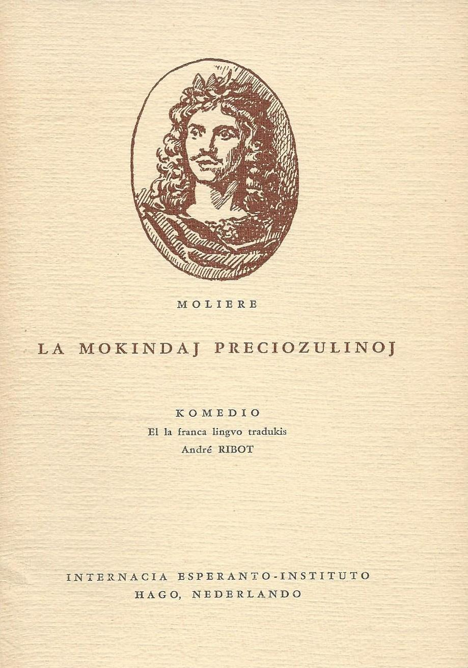 librokovrilo de "La Mokindaj Preciozulinoj", 1958